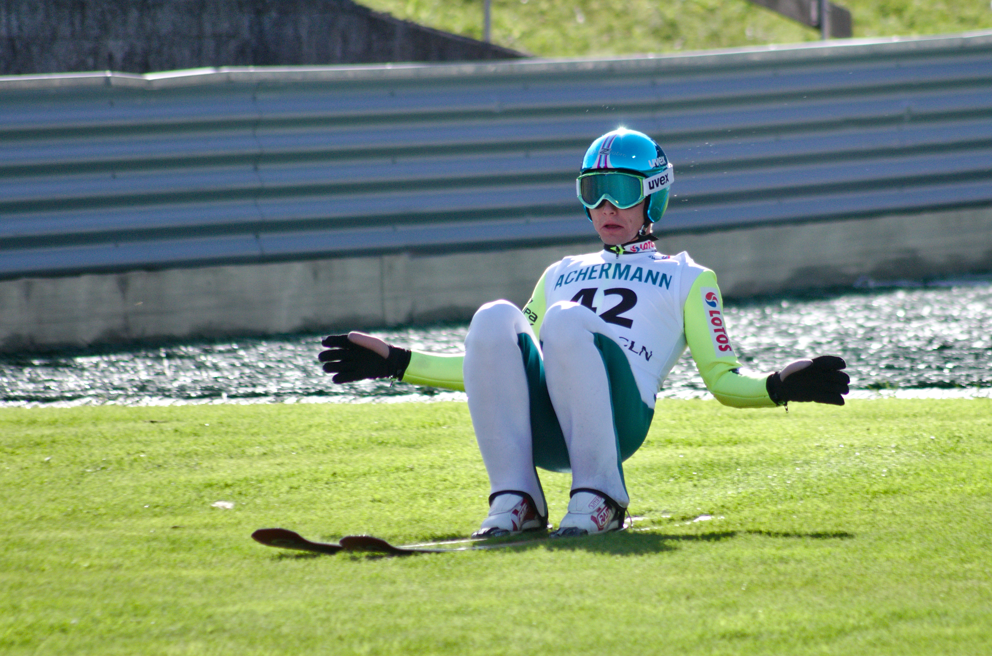 FIS Sommer Grand Prix 2014 - 20140809 - Jan Ziobro